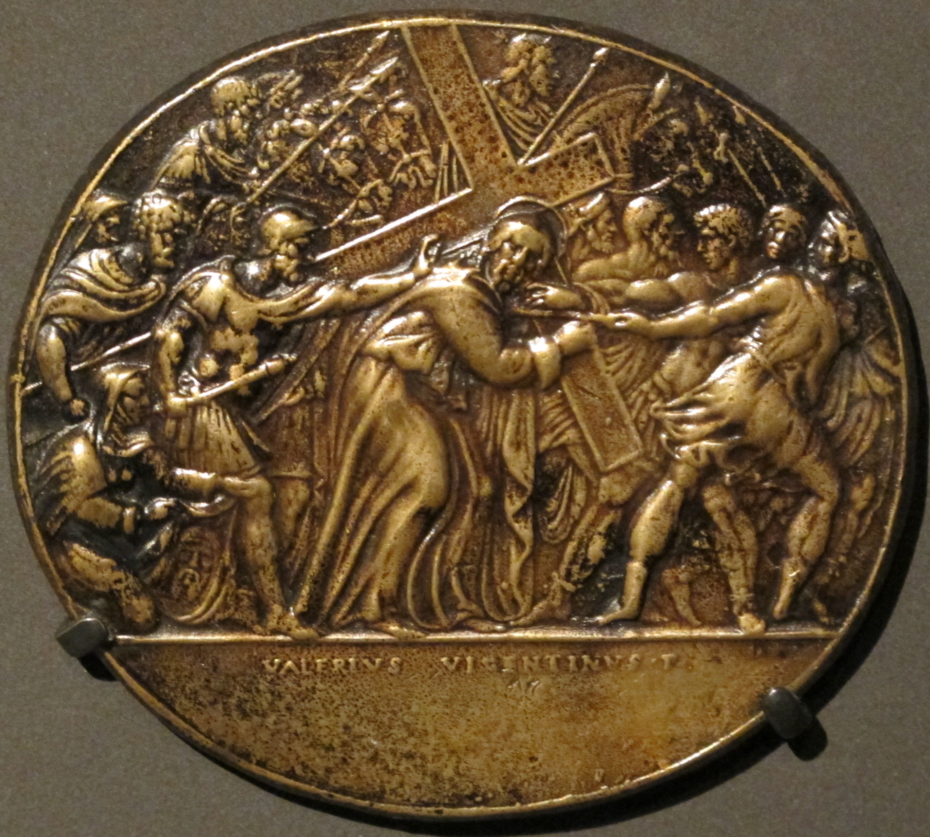 Da valerio belli, presentazione di gesù al tempio, 1530-50 ca.